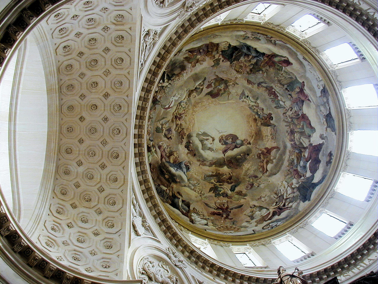 Paris 5ème arrondissement - Val-de-Grâce - Eglise - Dôme